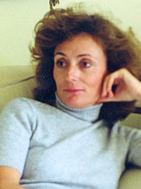 Clara Crabbé Rocha